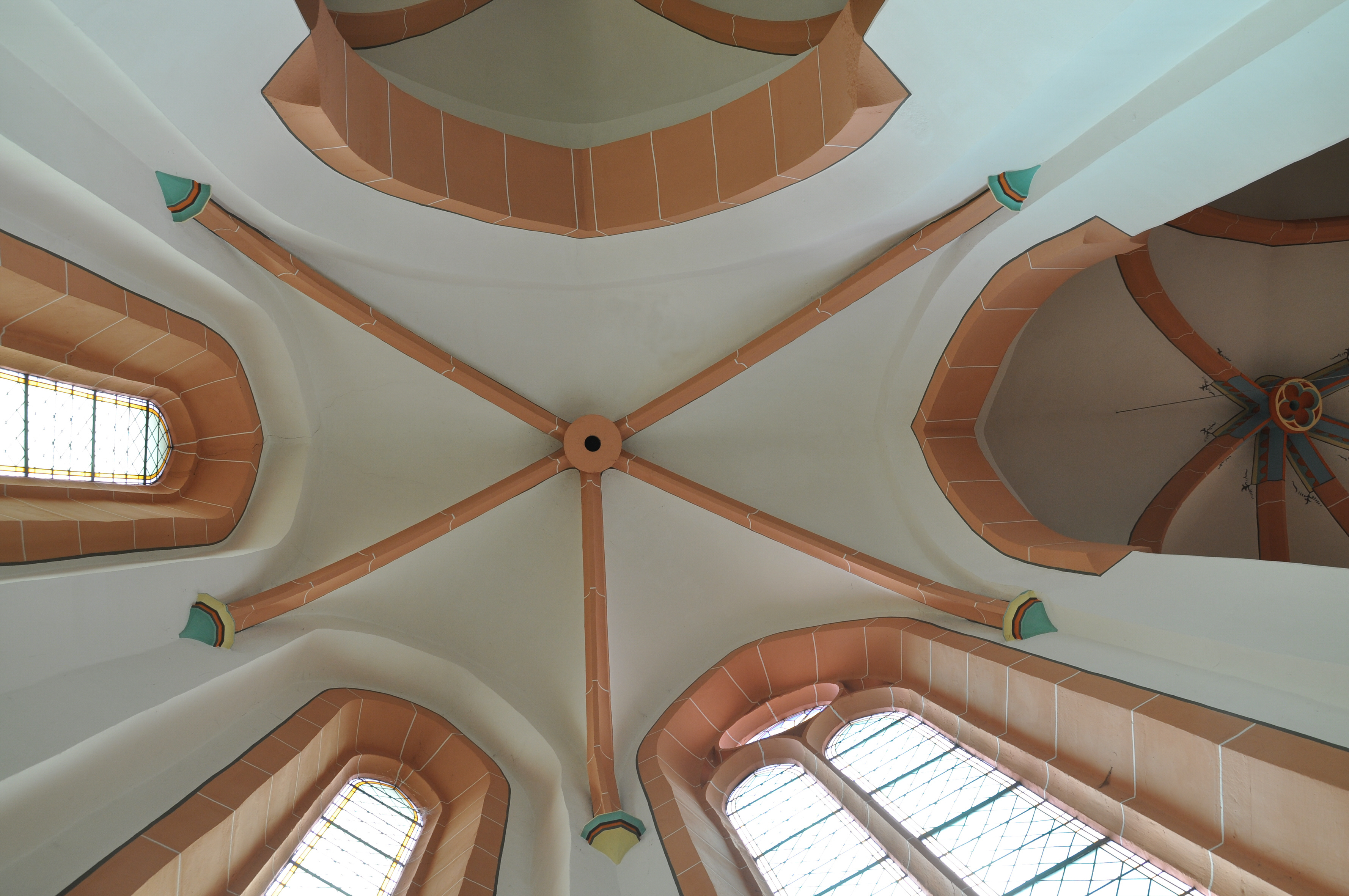 Gewölbe des (nördlicheen) Seitenchores